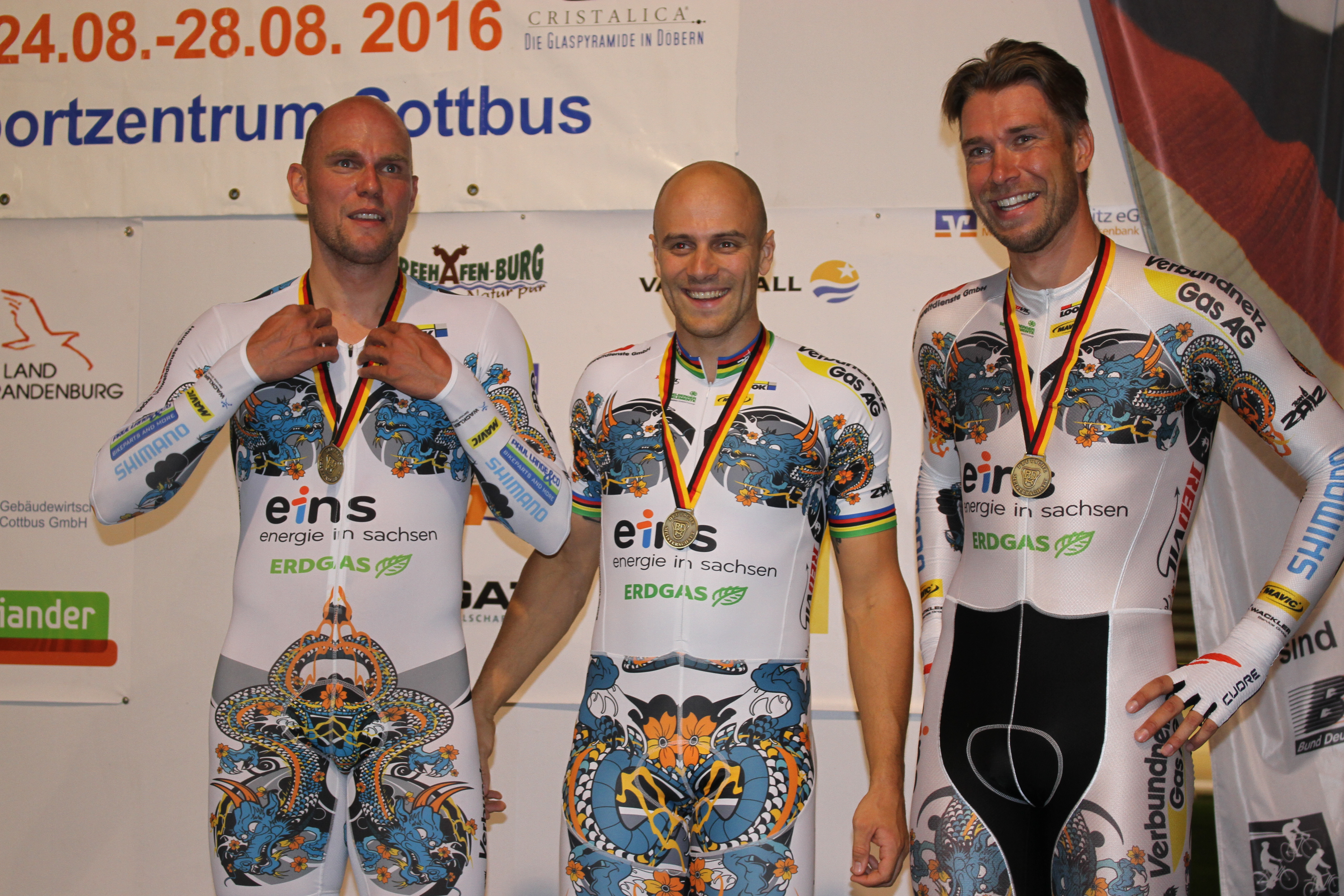 Team Erdgas, 3. Platz Teamsprint, v.l.n.r.: Sascha Hübner, Maximilian Levy, Roger Klauge